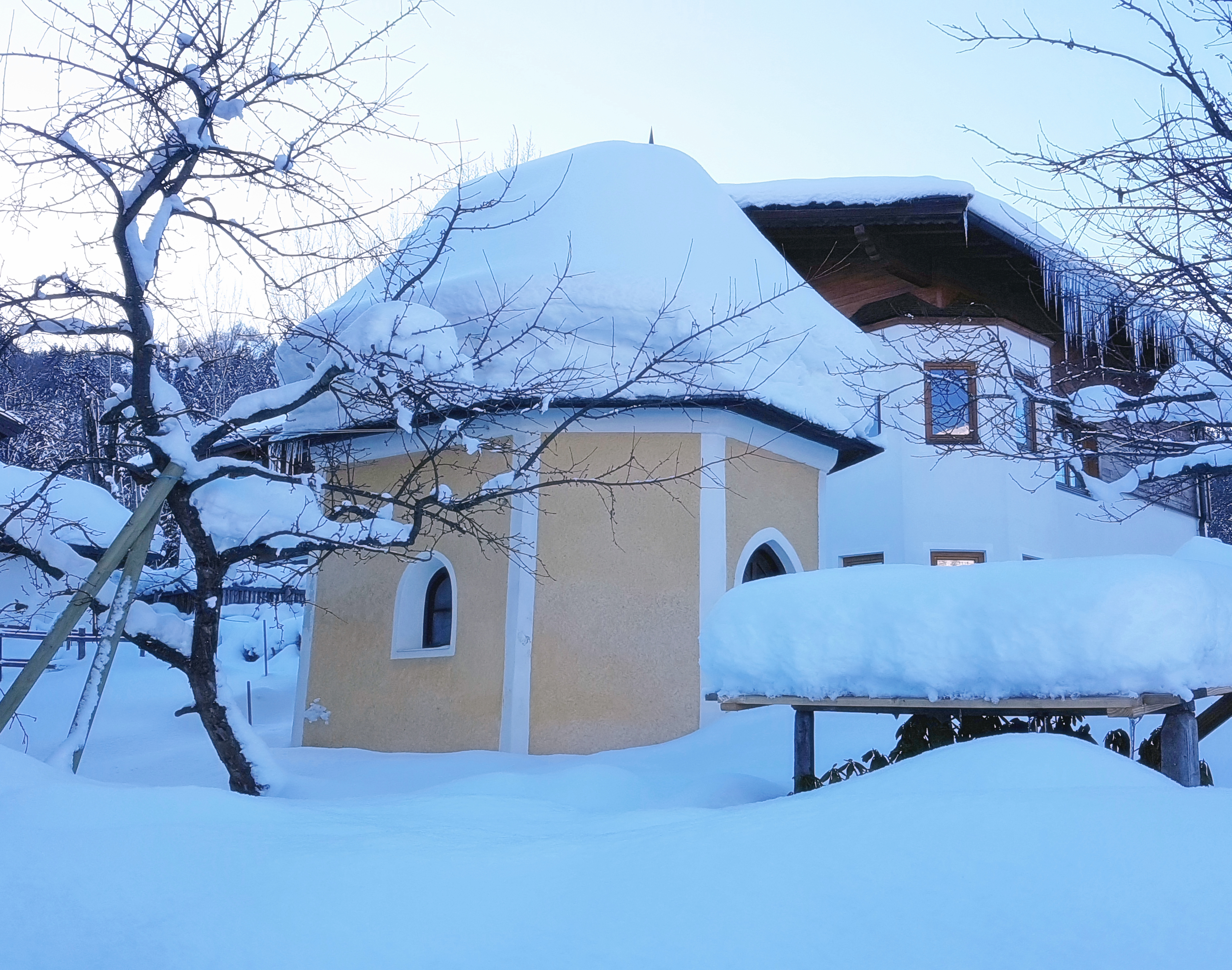 Kitzbühel, Gröbenbachkapelle an der Burgstallstrasse im Nordwesten der Stadt. This media shows the remarkable cultural object in the Austrian state of Tyrol listed by the Tyrolean Art Cadastre with the ID 9966. (on tirisMaps, on tirisdienste.at, pdf, more images on Commons)